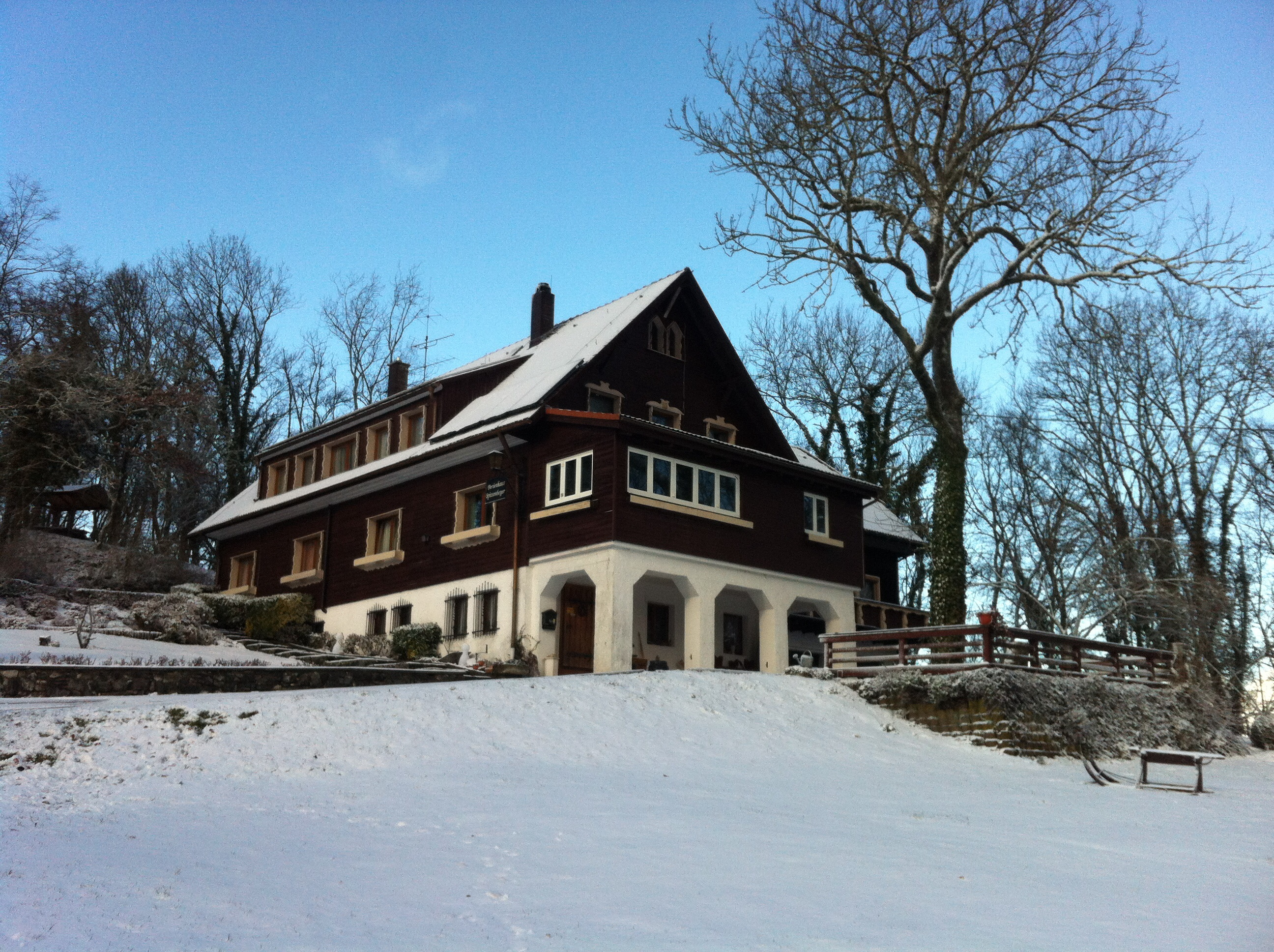 Küssaburg im Landkreis Waldshut, Baden-Württemberg. Umfeld: Ehemalige Jugendherberge und heutiges Ferienhaus (Umbau 1978).